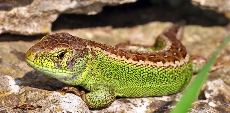 Zauneidechse (BW)